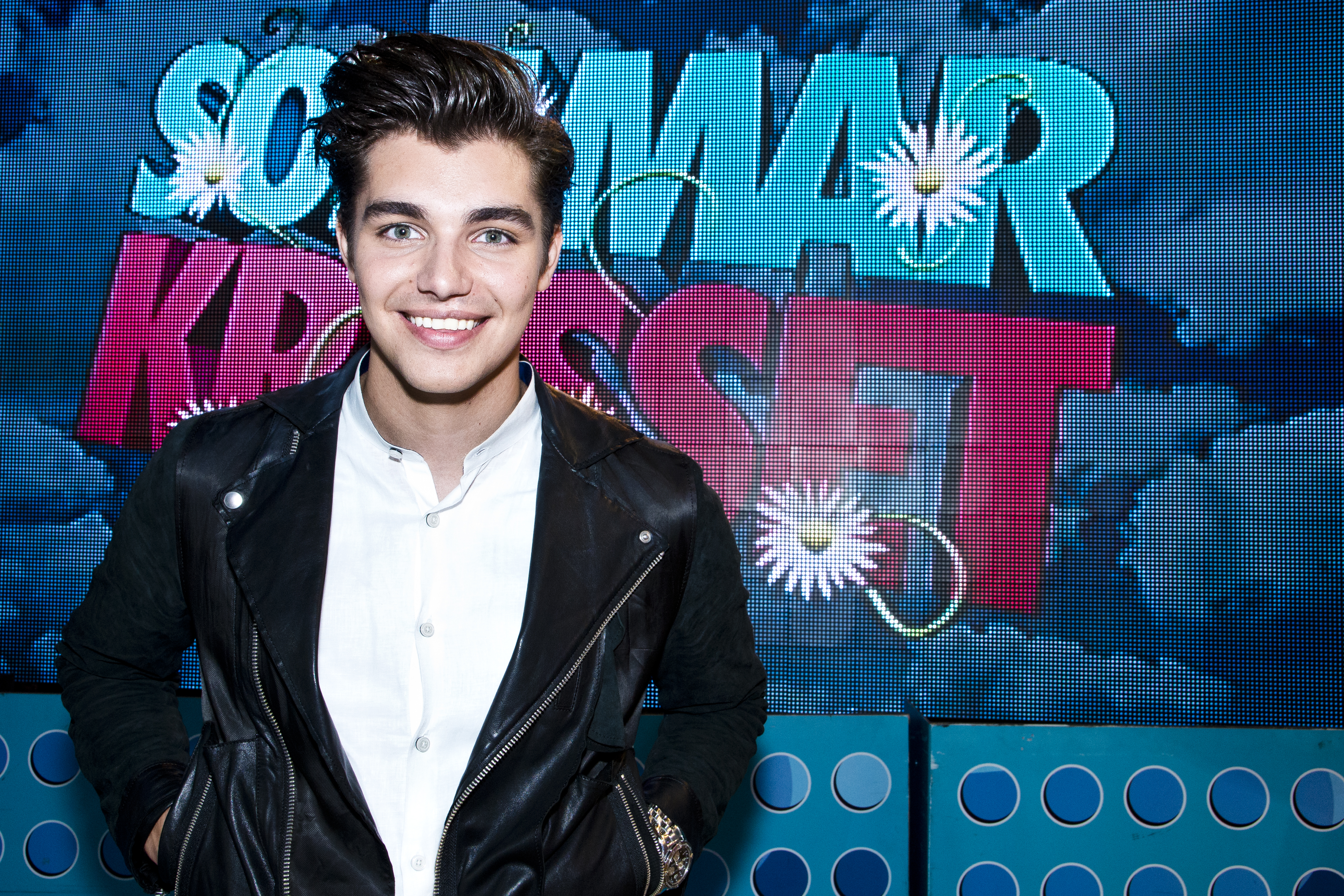 Anton Ewald på Sommarkrysset 2014